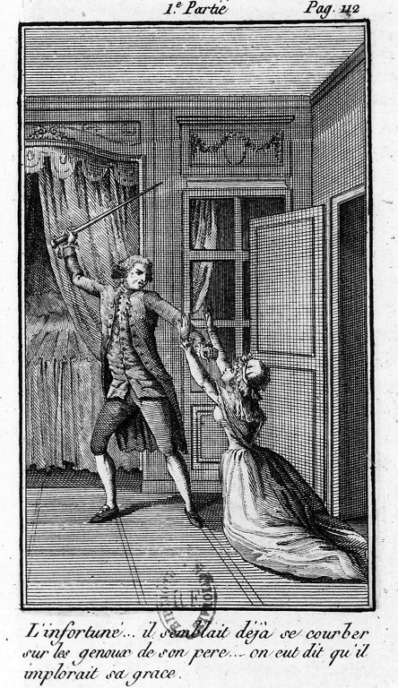 Tome 1. Première partie. Page 112 : Lettre XVI : Sophie suppliant Mirville. "L'infortuné... il semblait déjà se courber sur les genoux de son père, on eut dit qu'il implorait sa grâce."